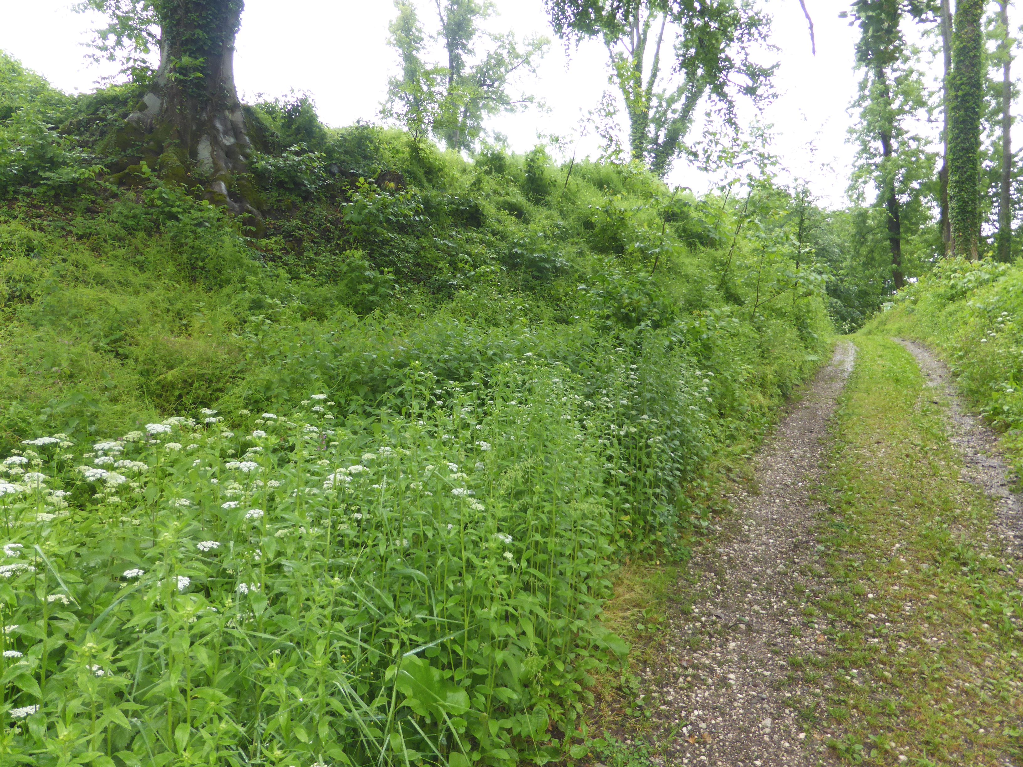 Lagestellt der Burg Volkersdorf